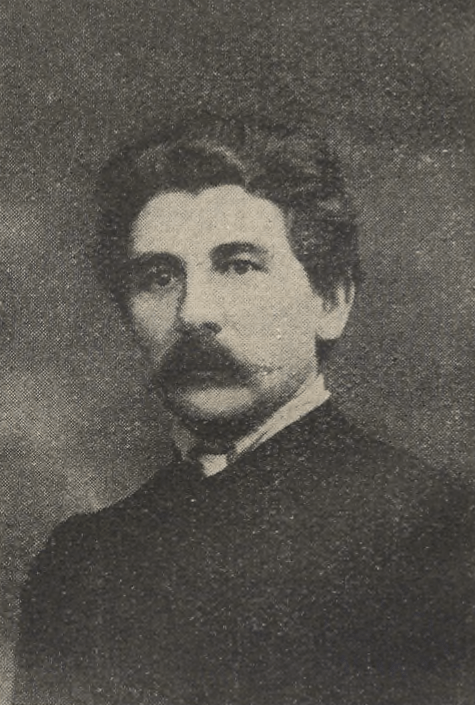 J Kynast